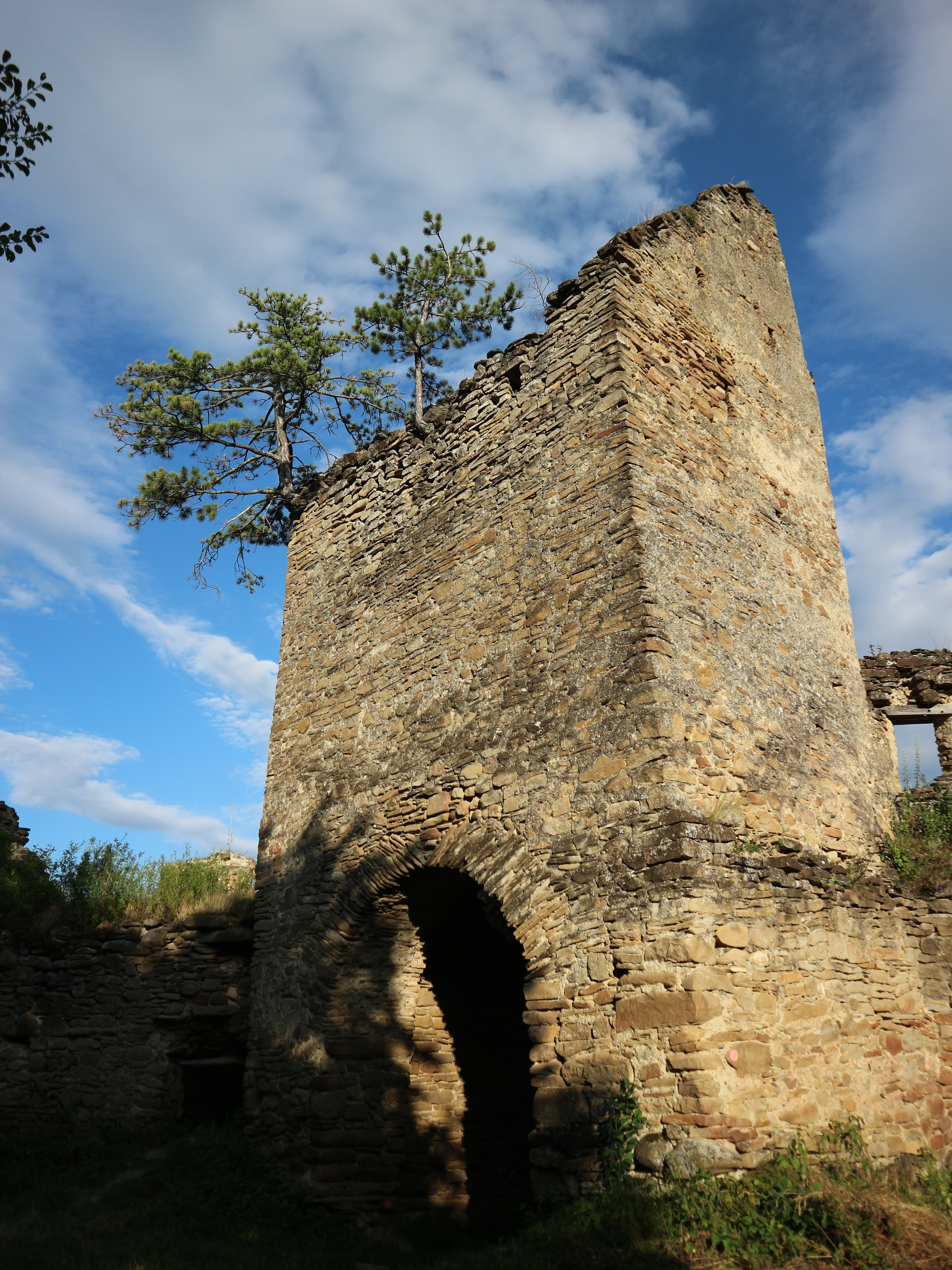 Cetatea țărănească Saschiz, poarta și turnul de acces